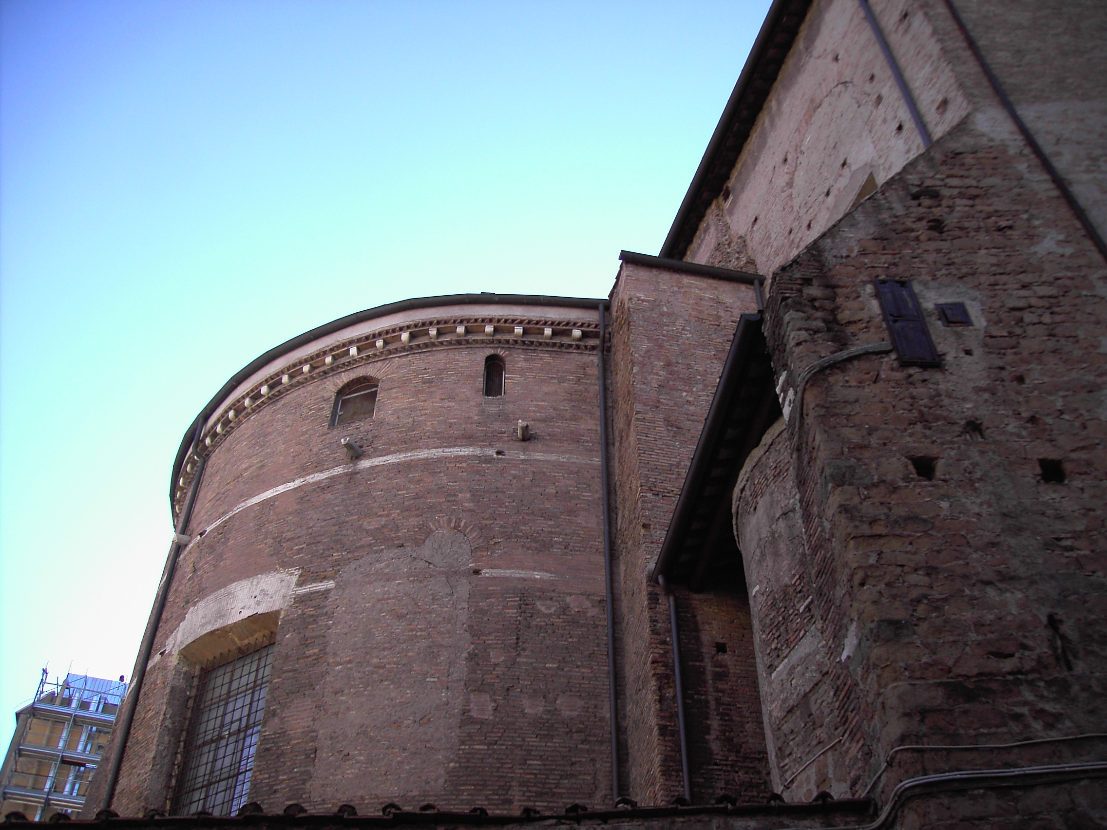 Roma, san Pietro in Vincoli - abside.